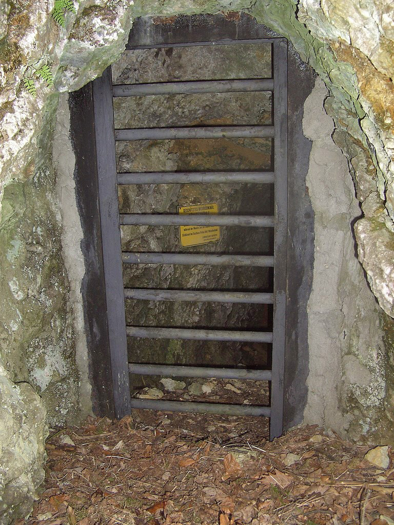 Försterhöhle, (Zeubacher Höhle), Katasternummer B 28, Geotop 472H007, Naturdenkmal, Landkreis Bayreuth